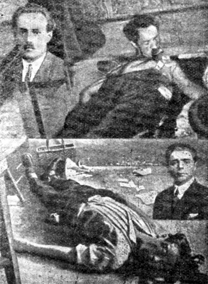 Srpskohrvatski / српскохрватски: Policijski snimak ubijenih sekretara SKOJ-a Janka Mišića i Mije Oreškog koji su pali u sukobu sa policijom 27. jula 1929. u Samoboru.